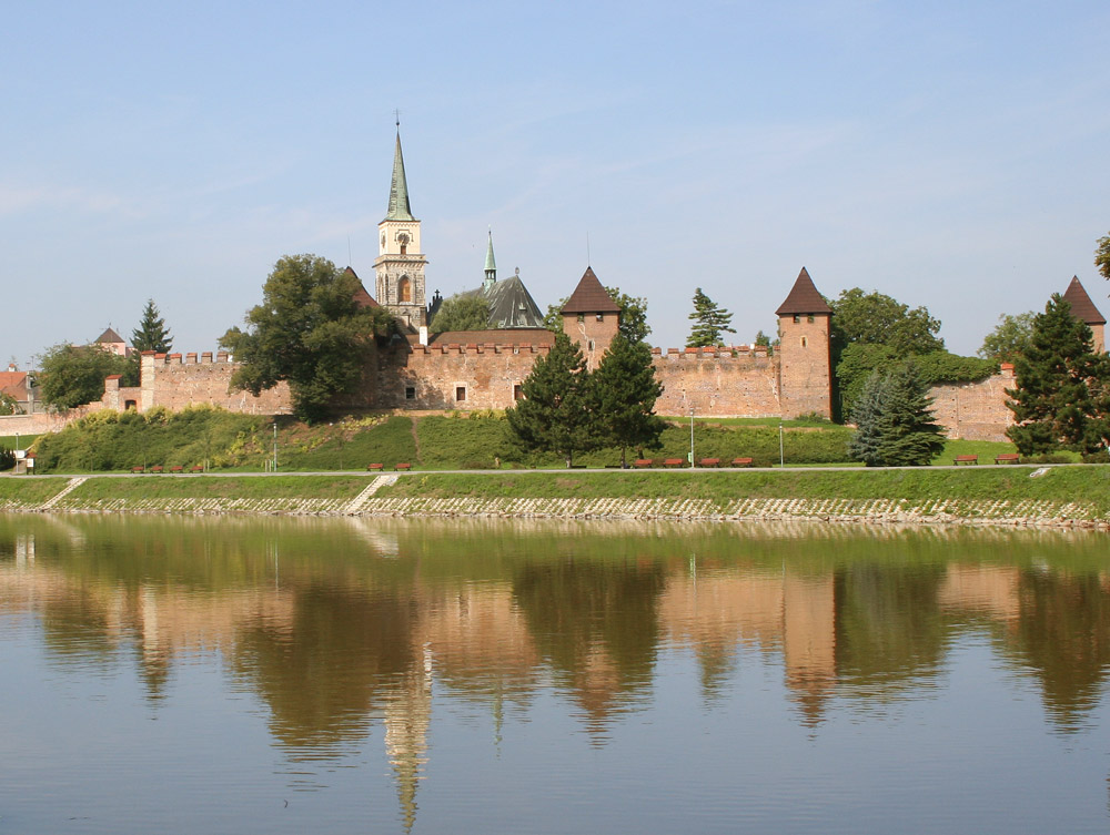 Středověké opevnění - hradby